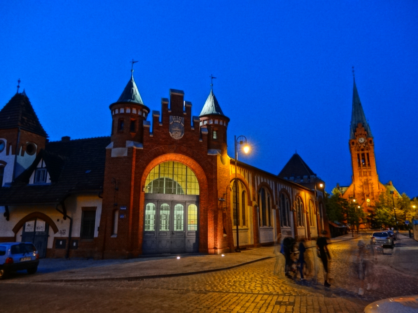 Miejska hala targowa w Bydgoszczy przy ul. Podwale bud. 1906 r.